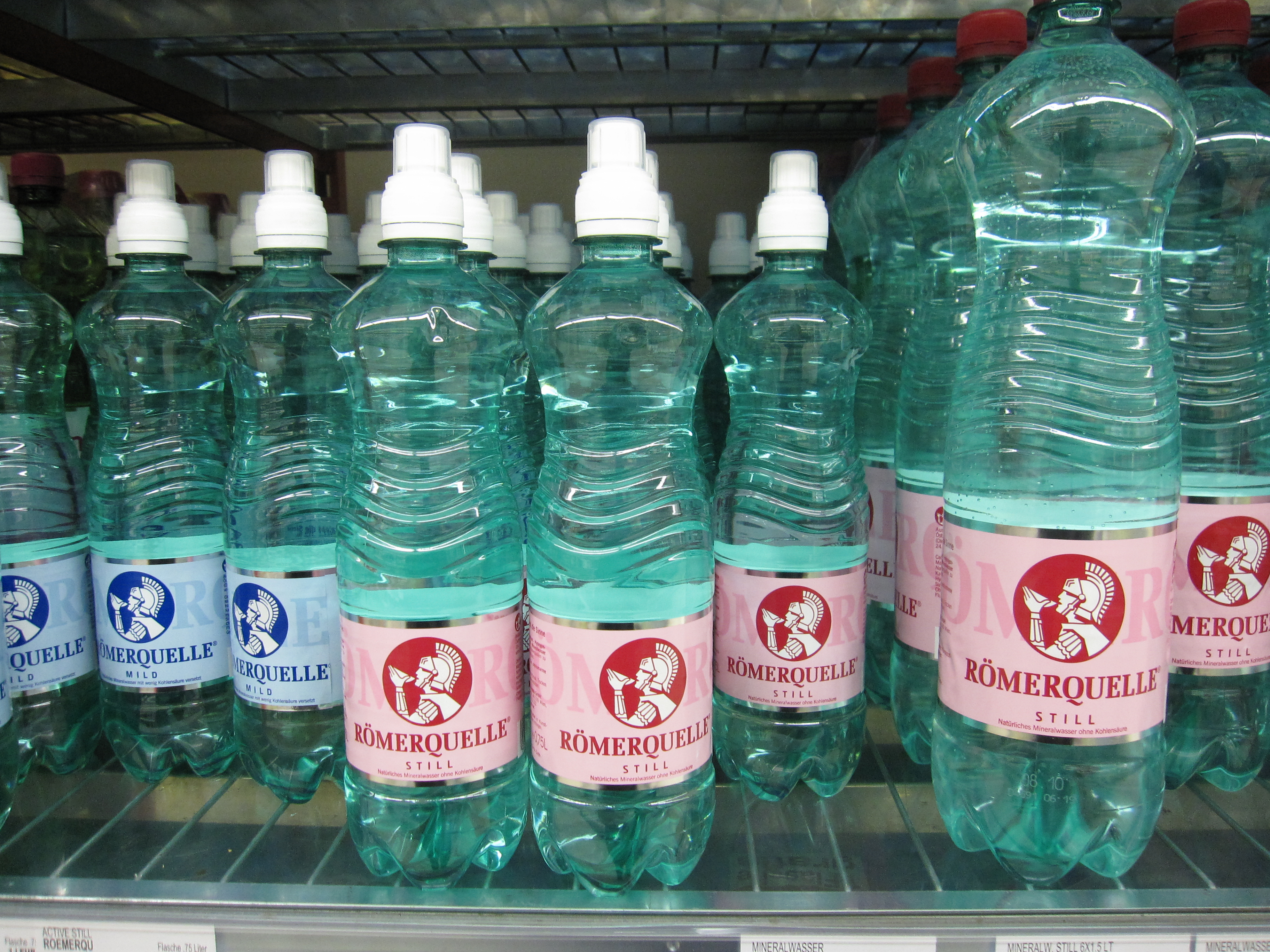 Römerquelle